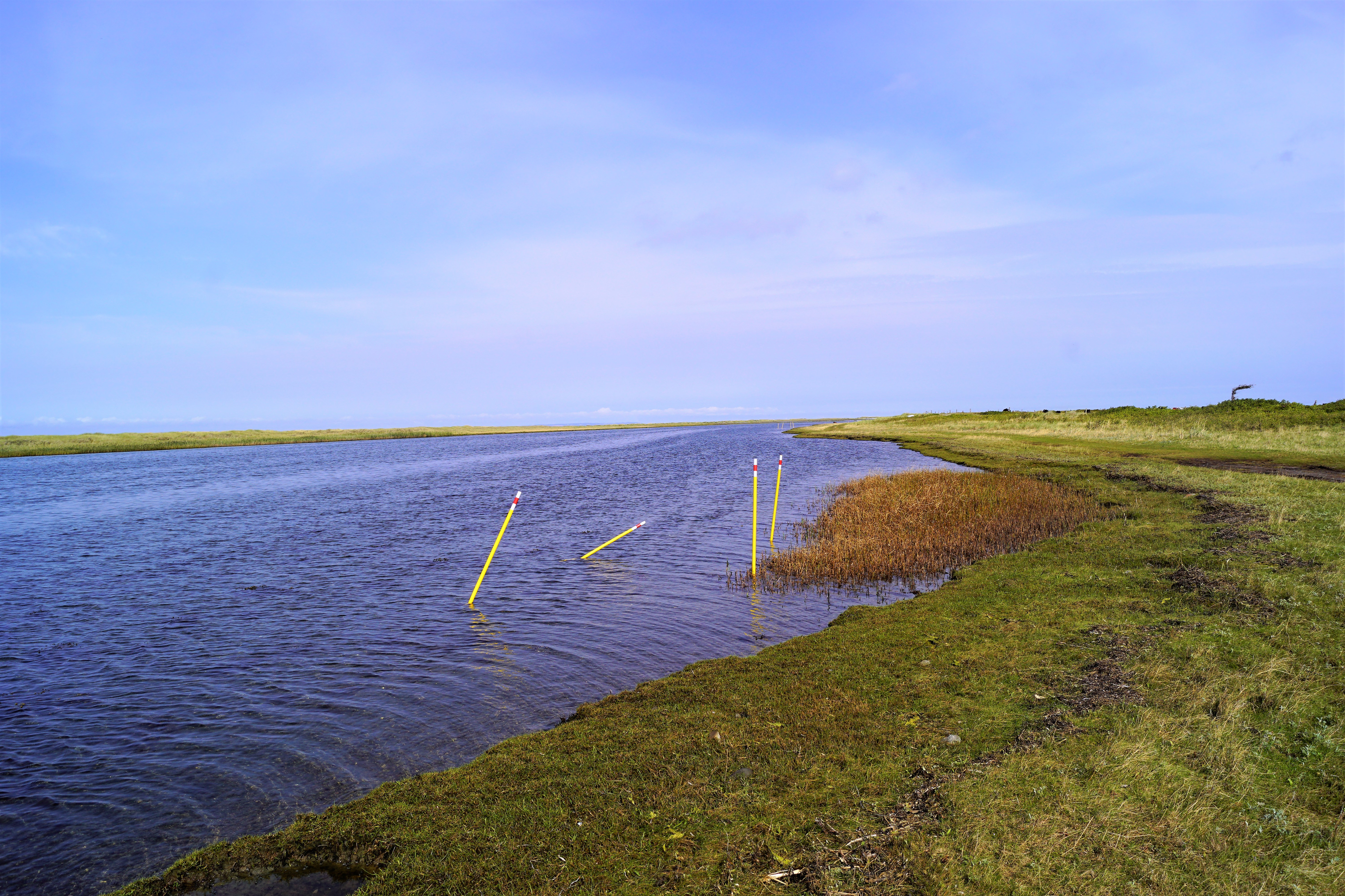 Bekæmpelse af Vadegræs ved vestenden af Læsø